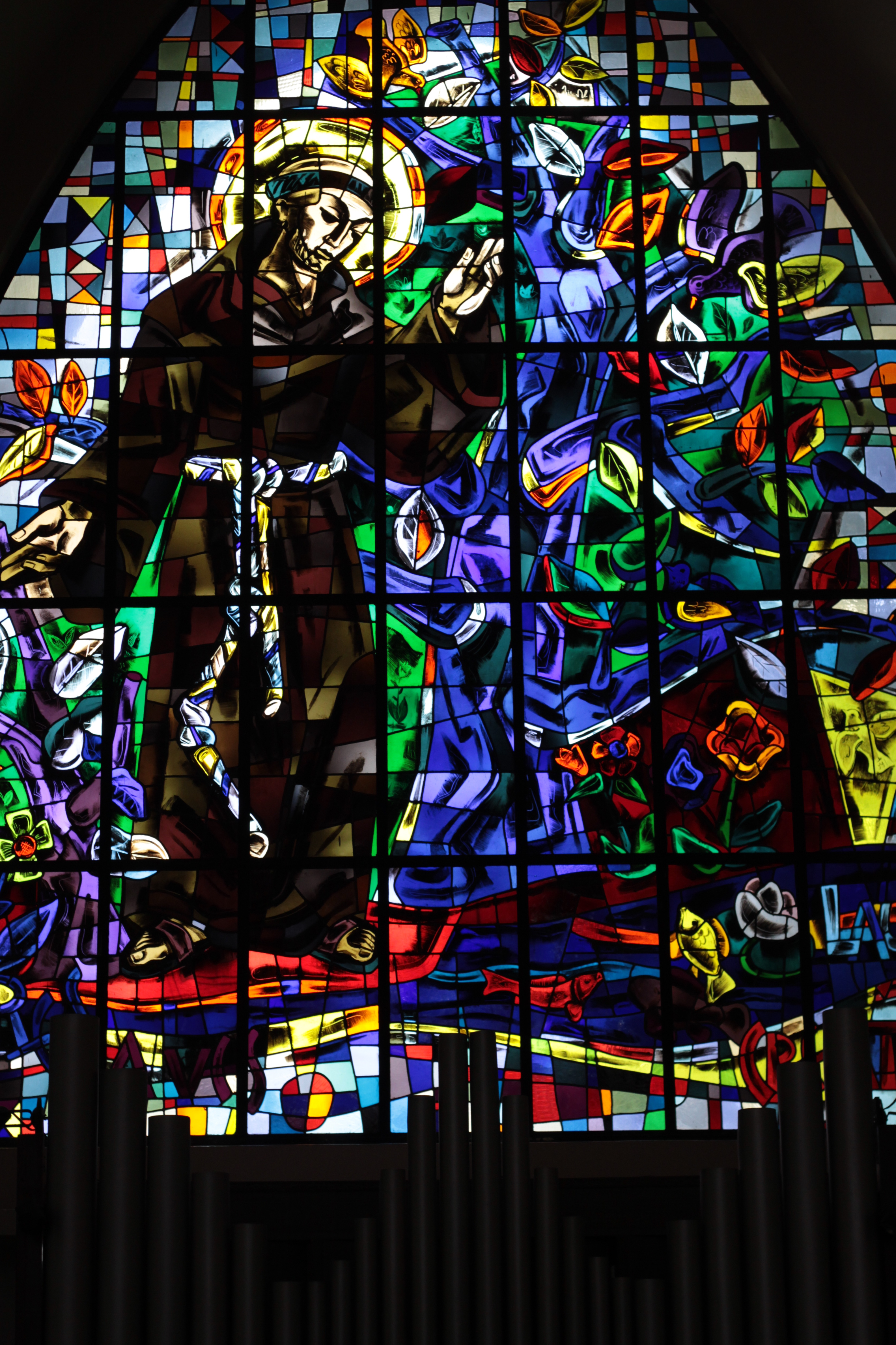 Vitral en Bogota. Colombia en el Colegio Gimnasio Moderno